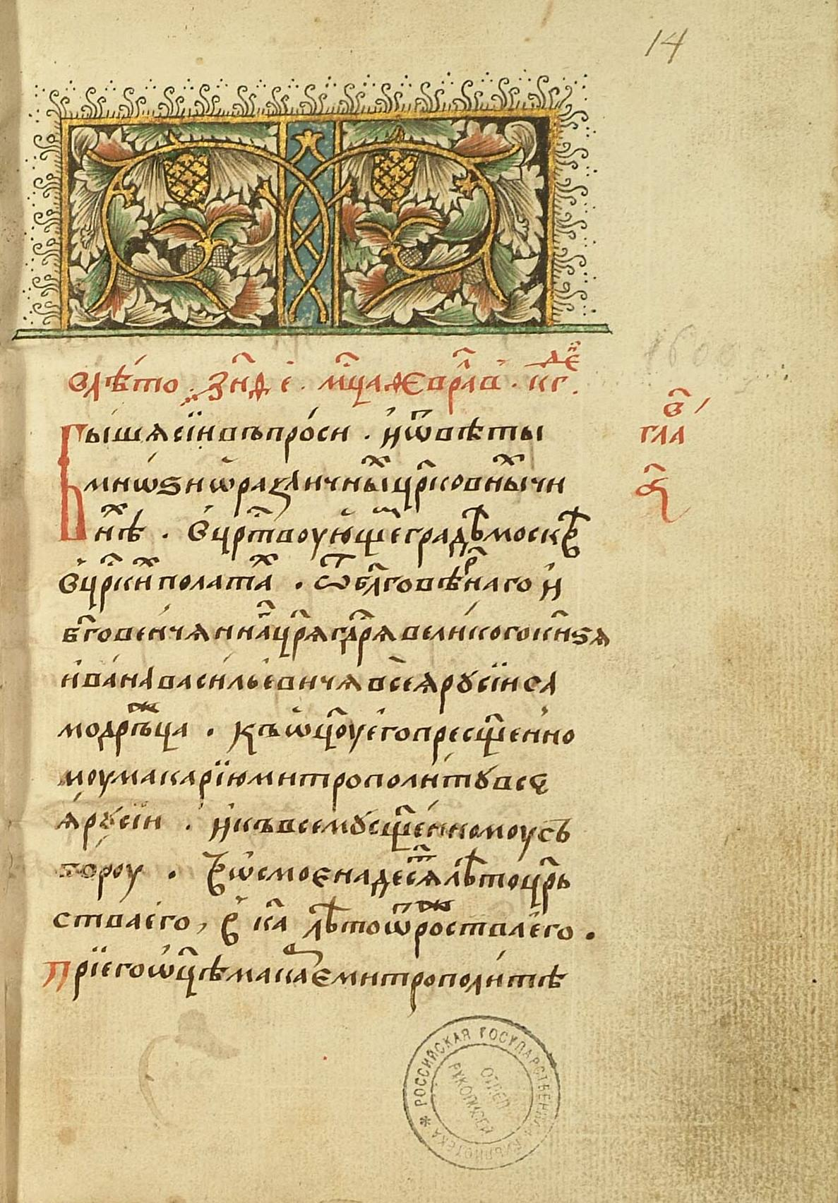 Рукопись № 215. (1919). Стоглав (постановления москов. Собора 1551 г.), полууст. четкий, современный, в четверть, 316 л., заглавная заставка фигурная с золотом. Фонд 304.I. Главное собрание библиотеки Троице-Сергиевой лавры.